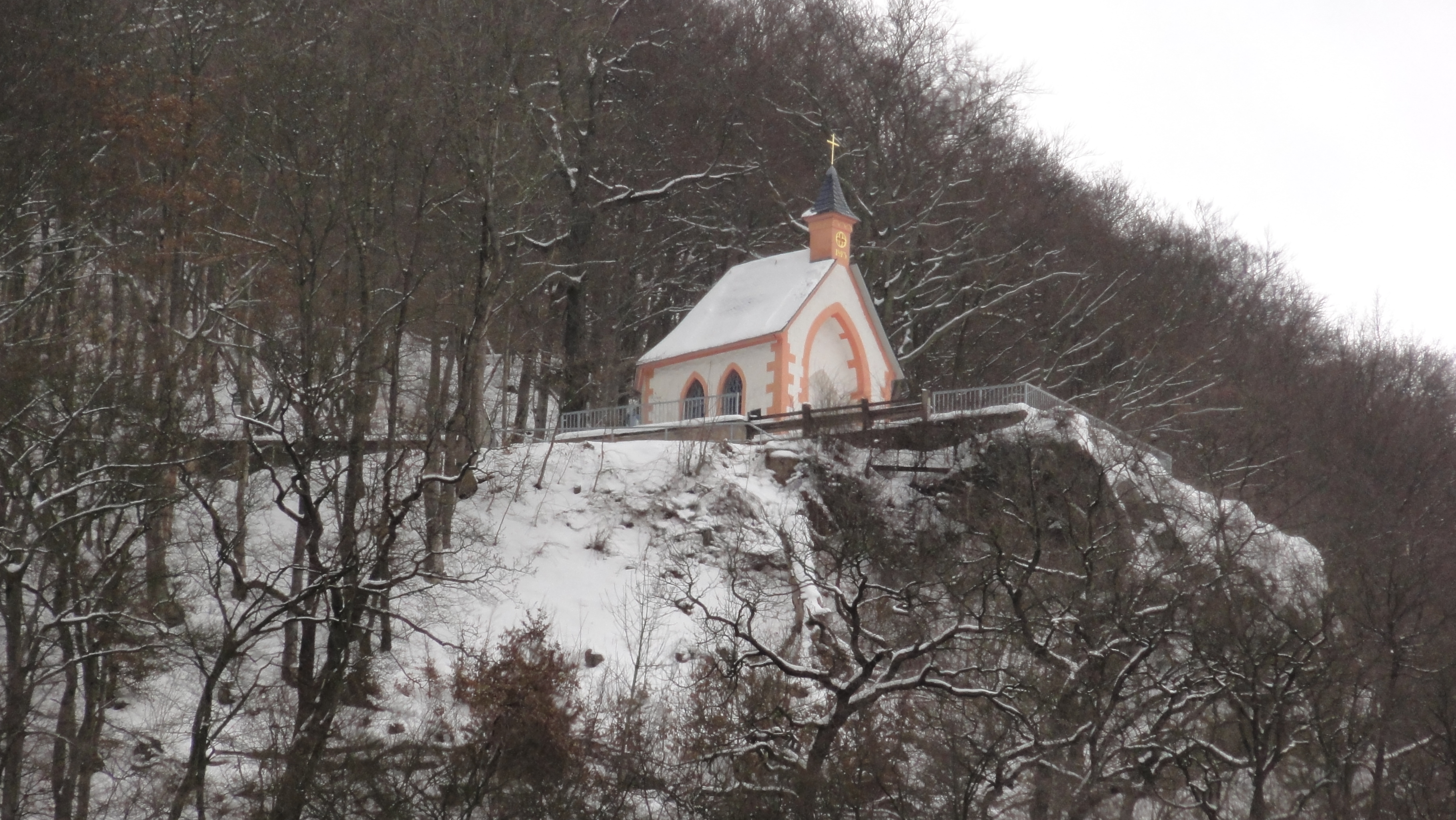 Ottilienkapelle